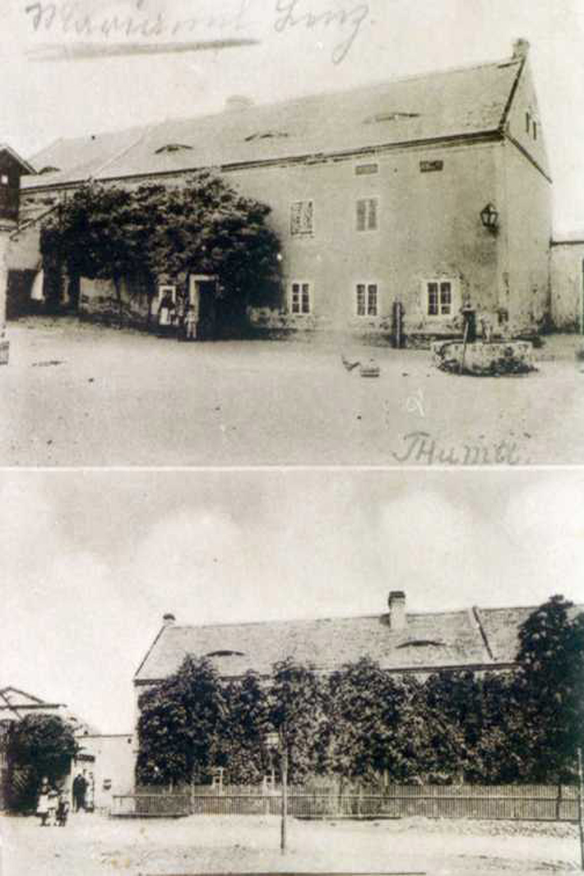 Dorf Velebudice (Wellbuditz) bei Most (Brüx) in Tschechien.